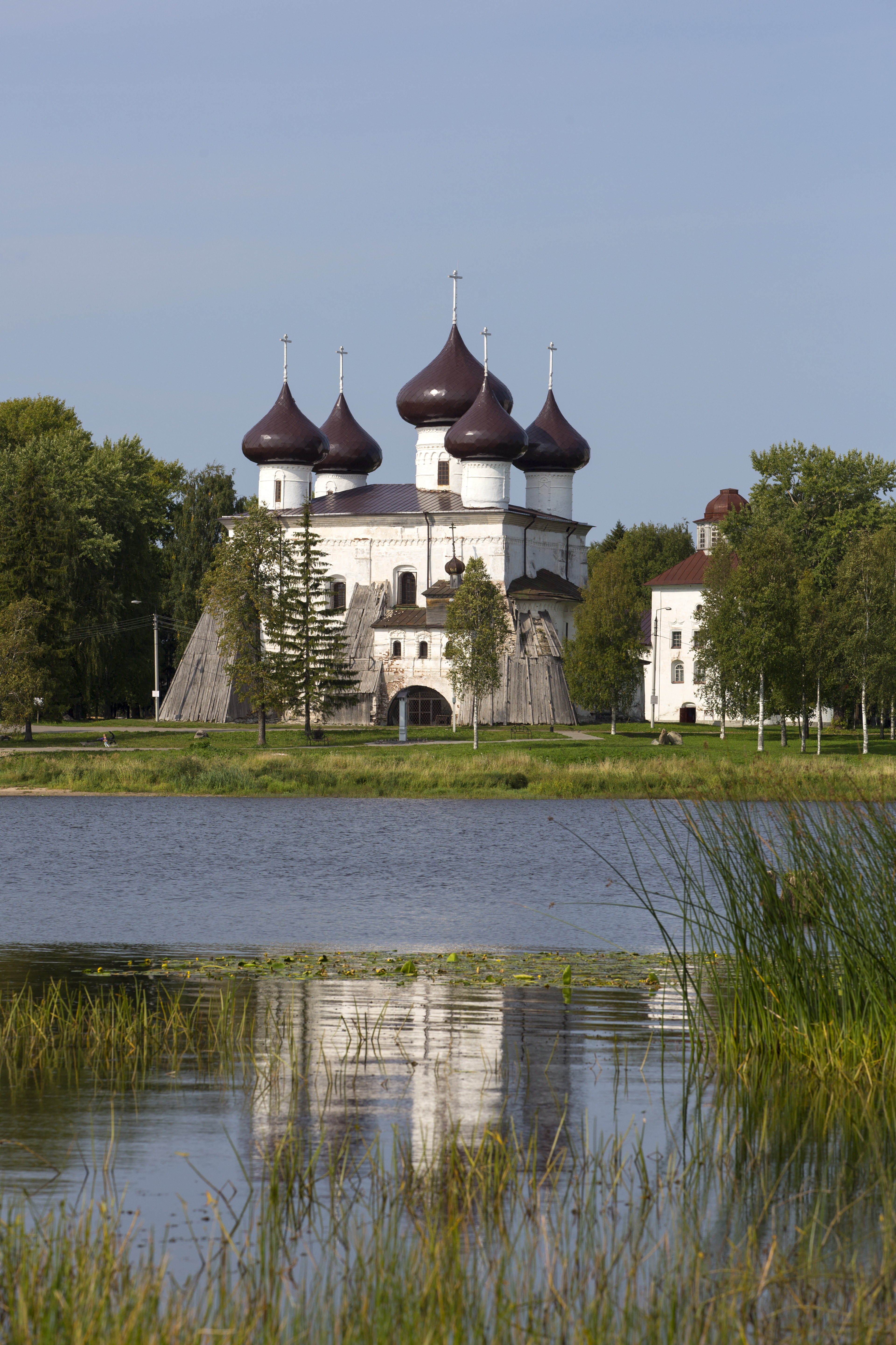 Собор Рождества Христова: площадь Соборная, Каргополь, Каргопольский район, Архангельская область